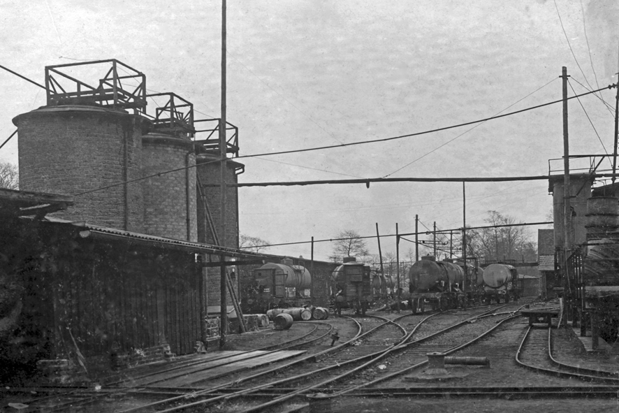 Erdölverladung im Gleisanschluss des Paraffin- und Mineralölwerks Messel